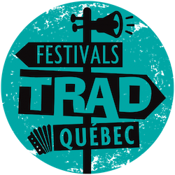 Le logo de Festivals Trad Québec, créé par le Conseil québécois du patrimoine vivant.